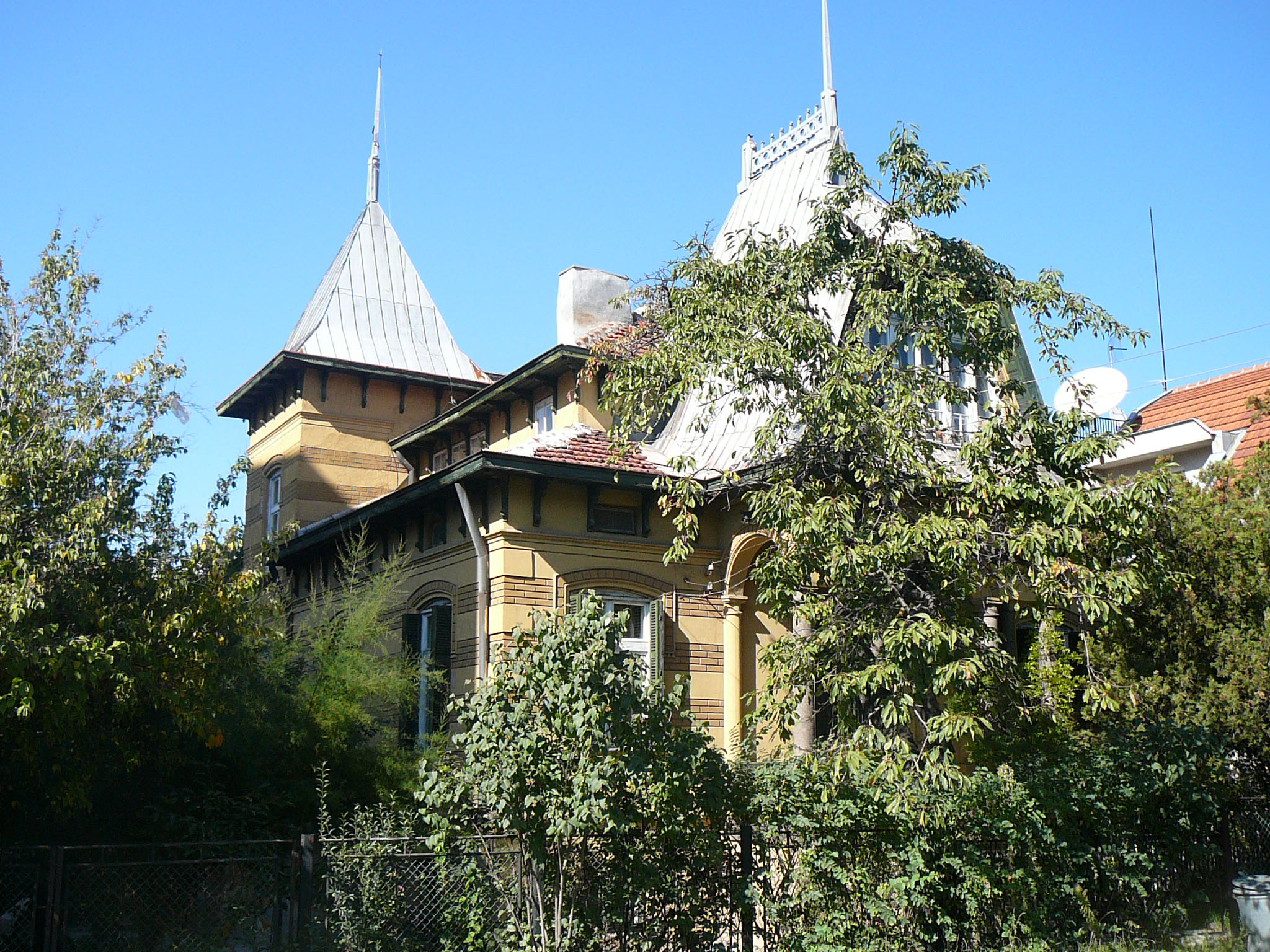 Pavlovo,Sofia,Bulgaria